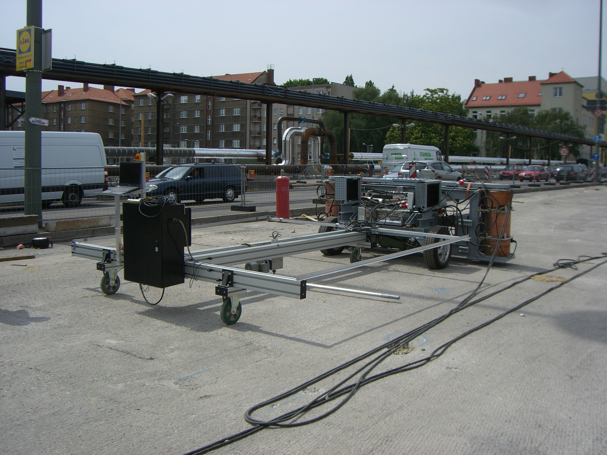 Mobile Spanndrahtbruchortung